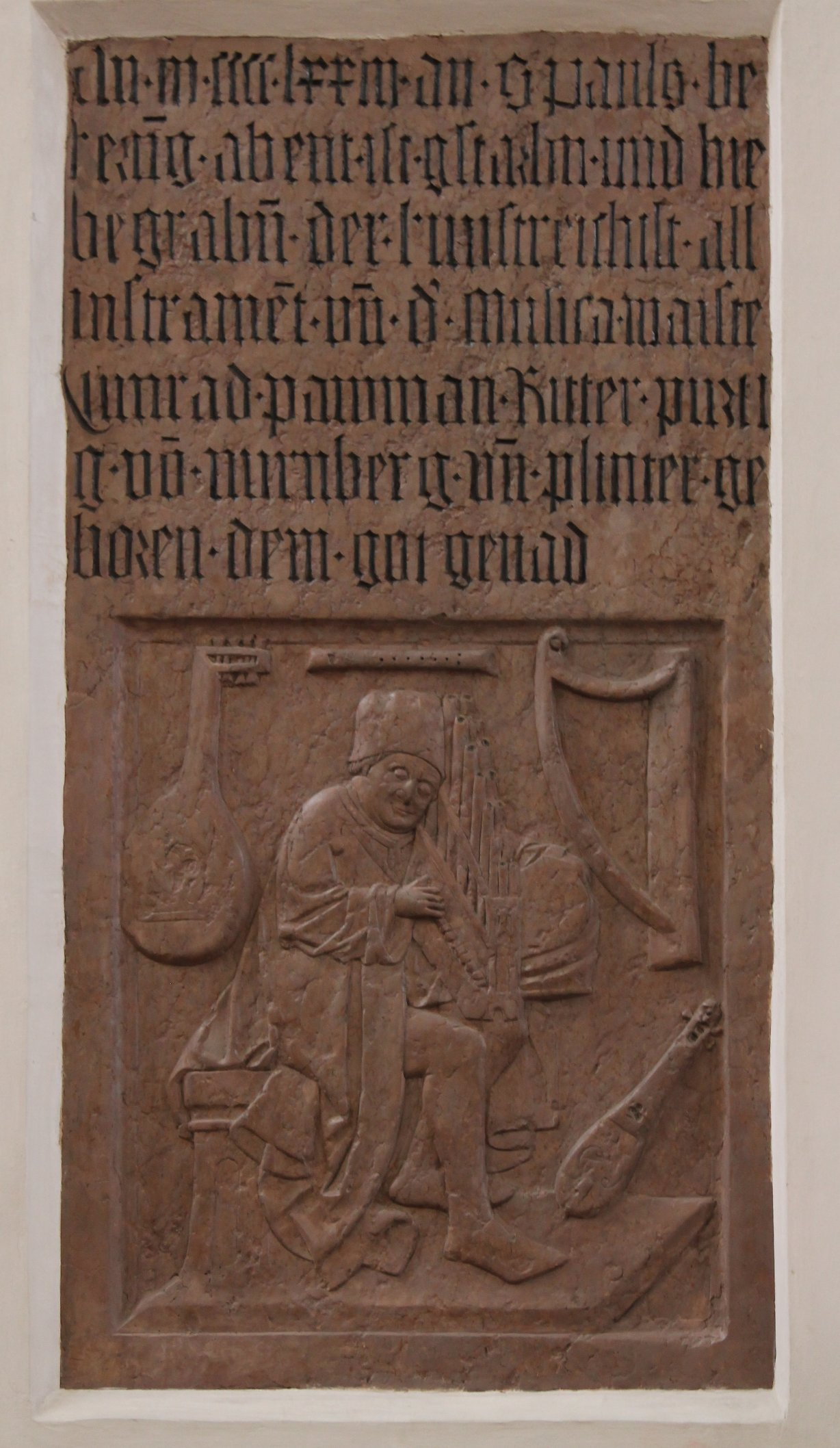 Epitaph von Conrad Paumann in der Frauenkirche München "An(no) MCCCCLXXII an S. Pauls bekerung abent (= 24.1.1473) ist gestarbn und hie begraben der kunstreichist aller instrament und der Musica maister, Cunrad pawman, Ritter, purtig von nurnberg und plinter geboren, dem got genad."